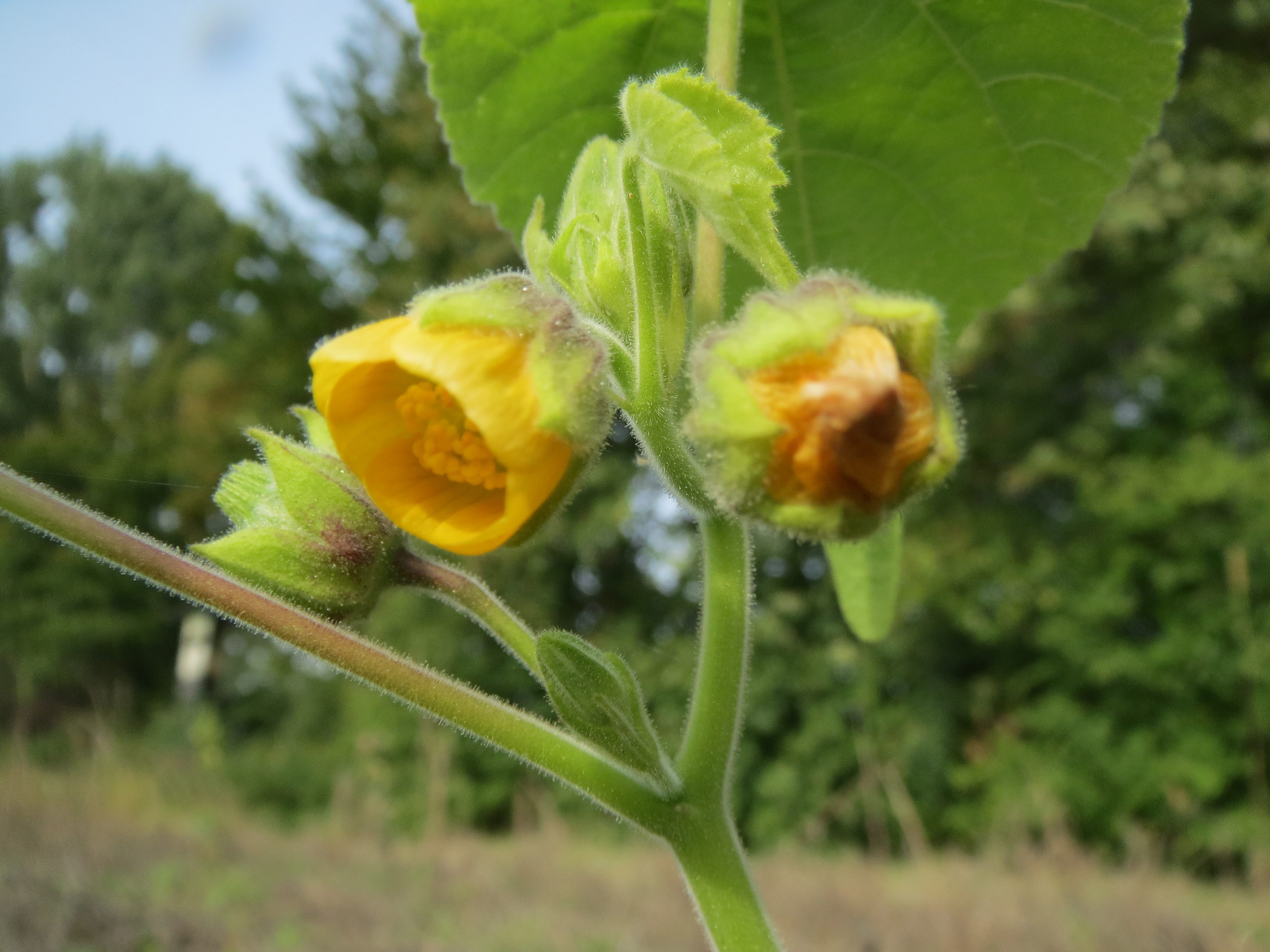 Samtpappel (Abutilon theophrasti) im Hockenheimer Rheinbogen